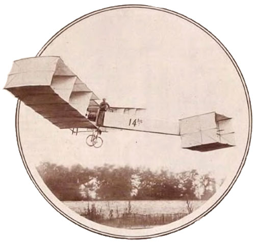 Photographie de l'avion monoplan de Santos-Dumont au dessus de la pelouse de Bagatelle (1906).